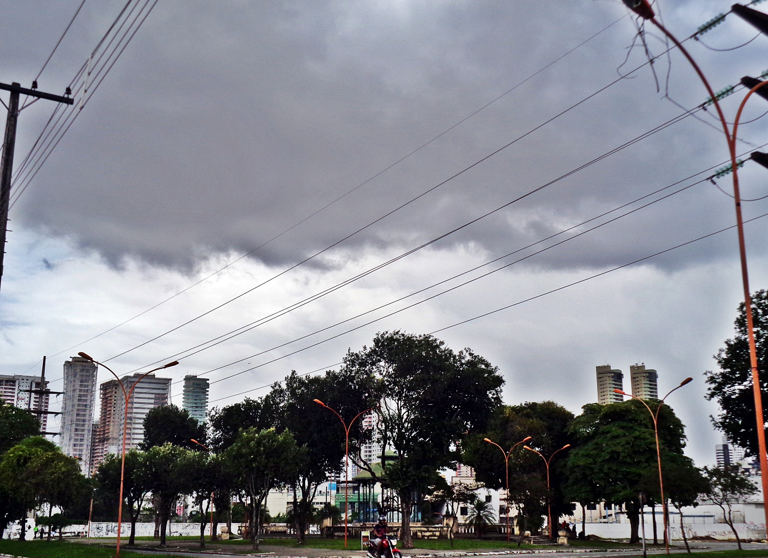 Praça Magalhães na Avenida Marechal Hermes.